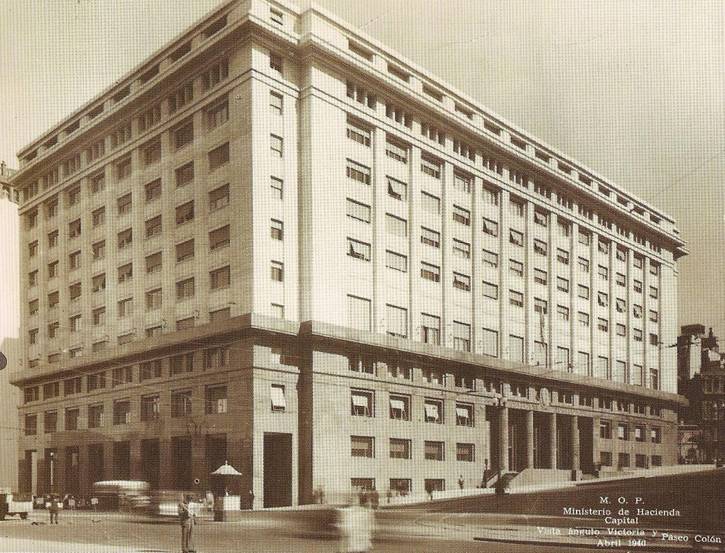 La primera etapa construida del Palacio de Hacienda (hoy Ministerio de Economía y Finanzas Públicas). Buenos Aires, Argentina.